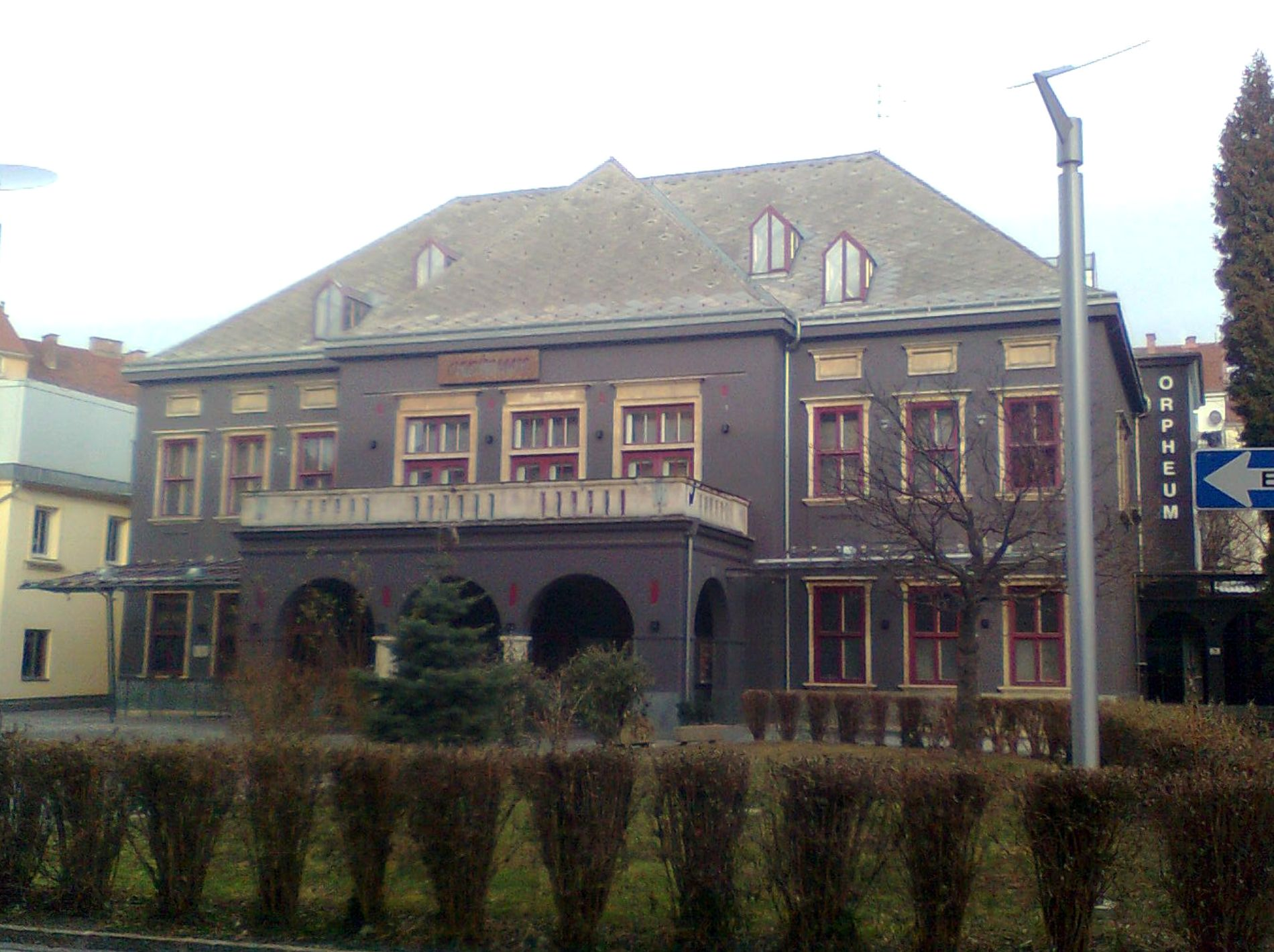 Grazer Orpheum